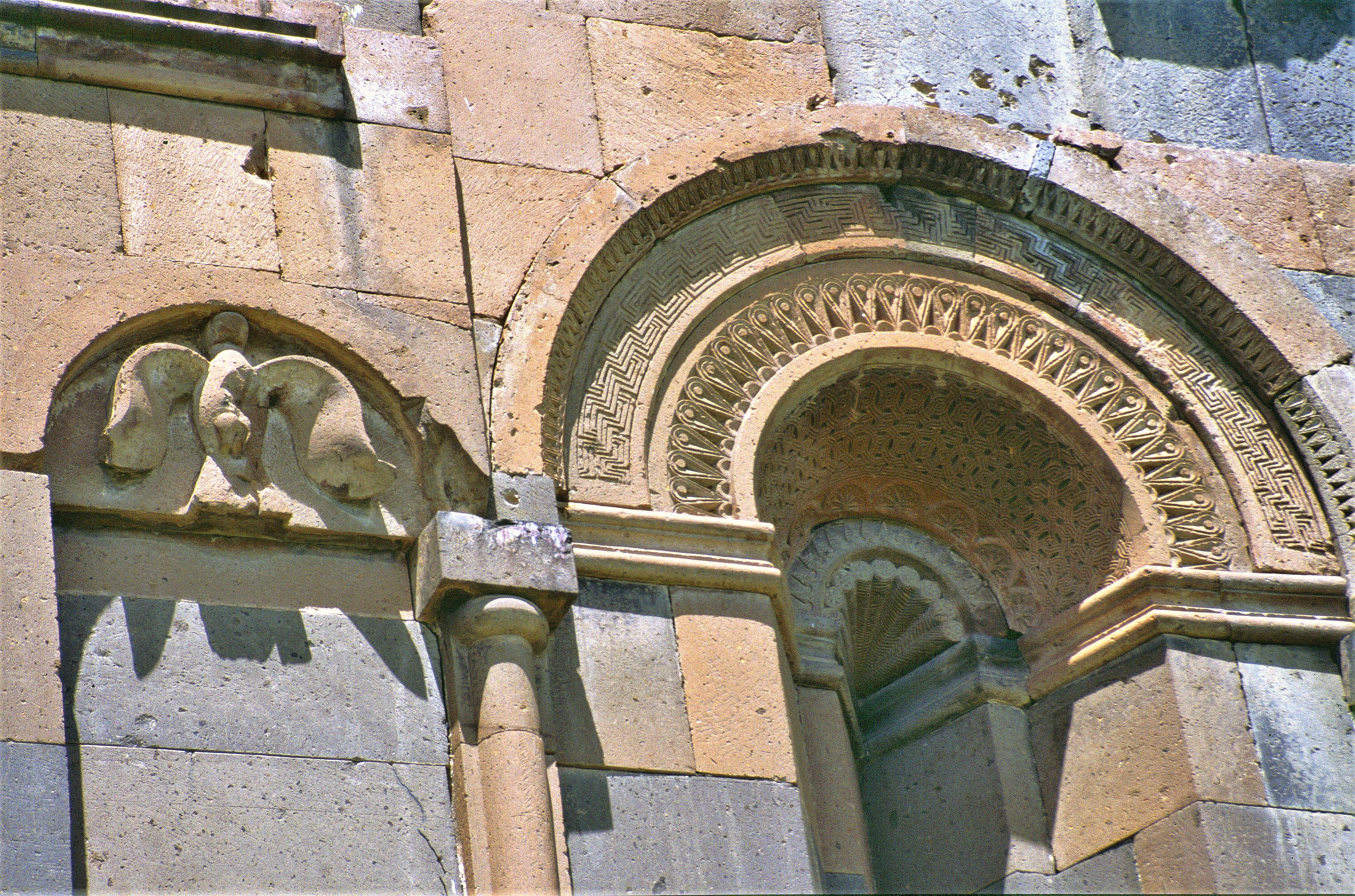 Kathedrale Ani, Detail